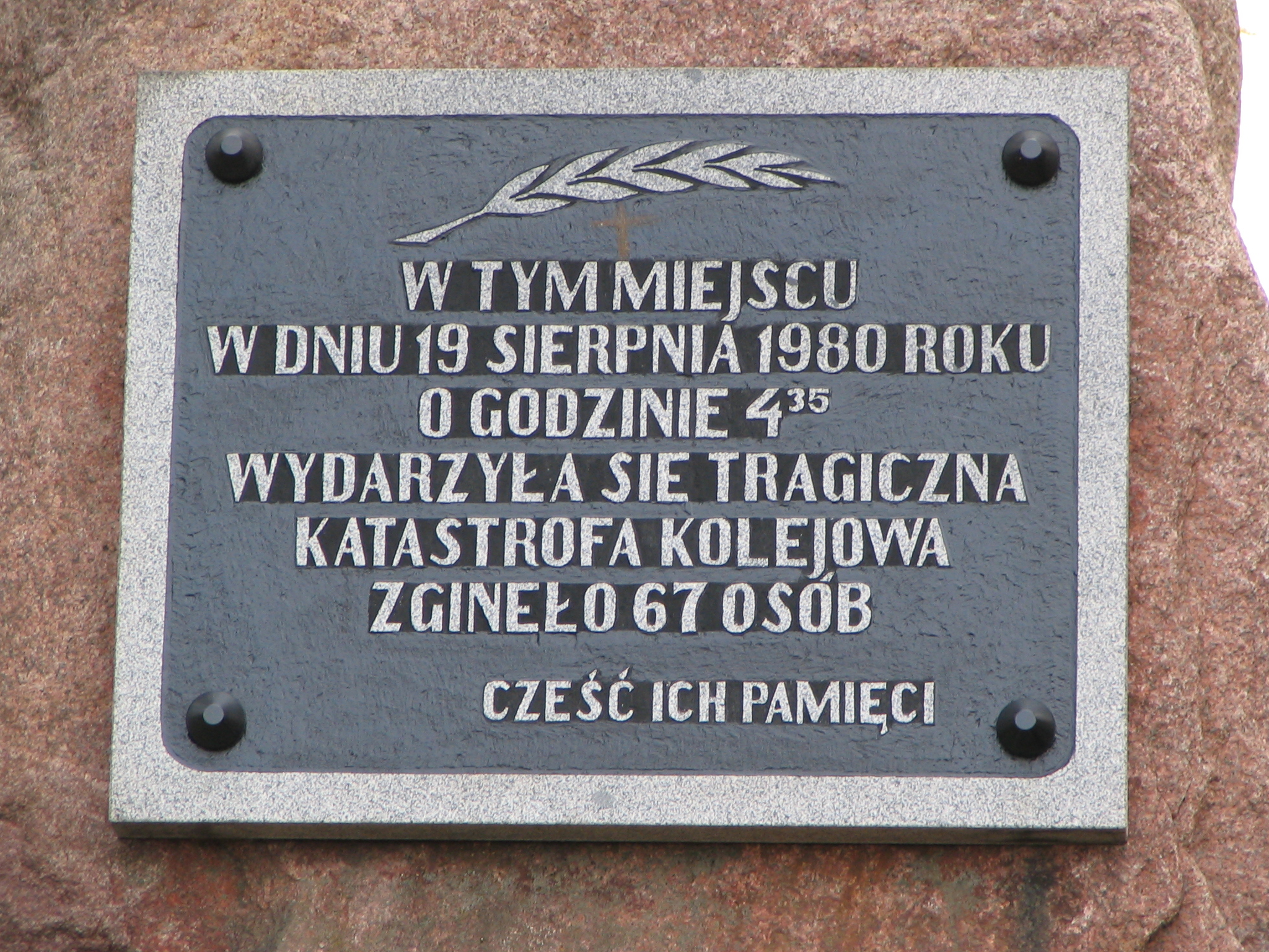 Tablica na pomniku w Otłoczynie